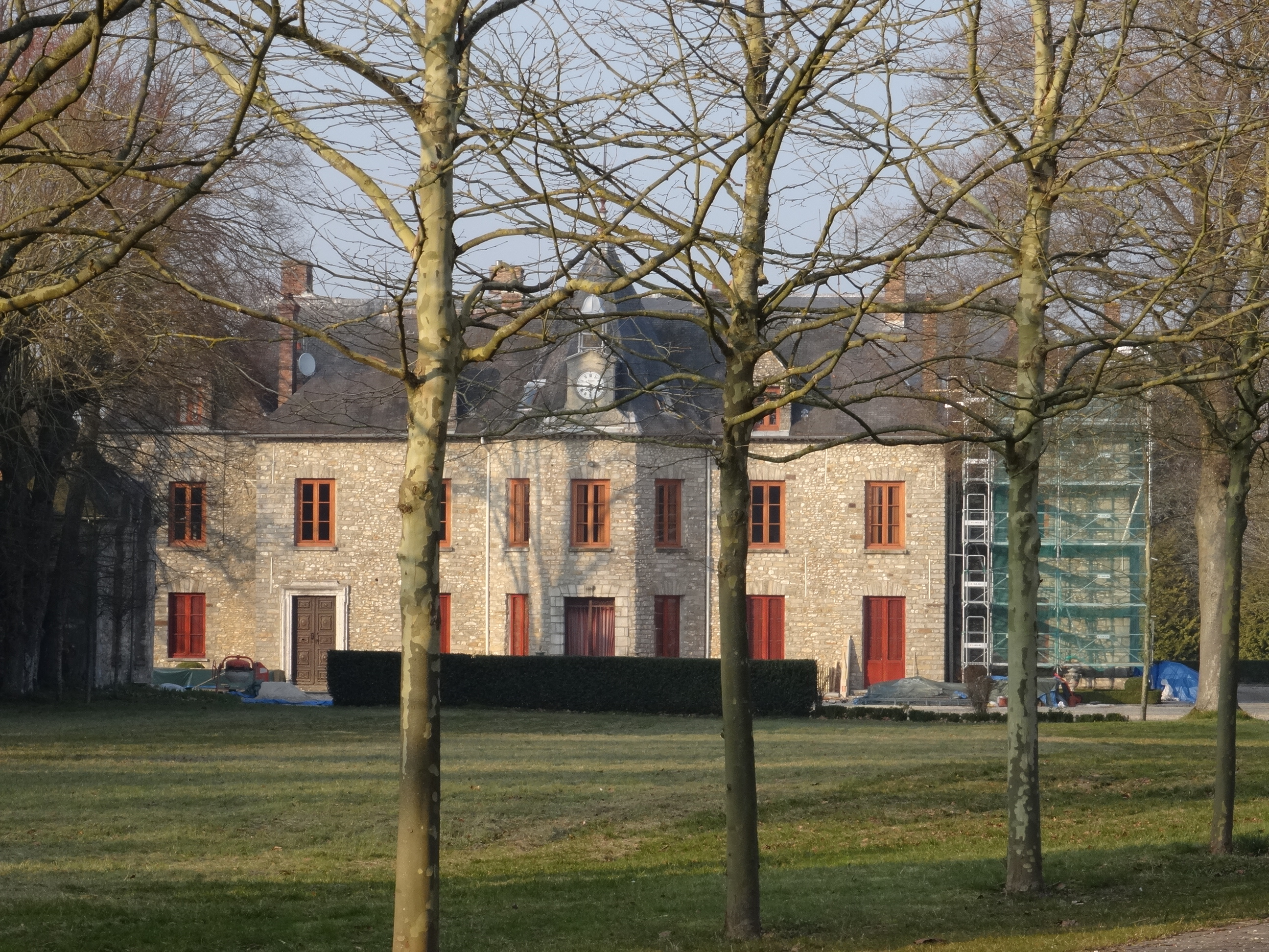 Château de Rubelles. (Seine-et-Marne, région Île-de-France).